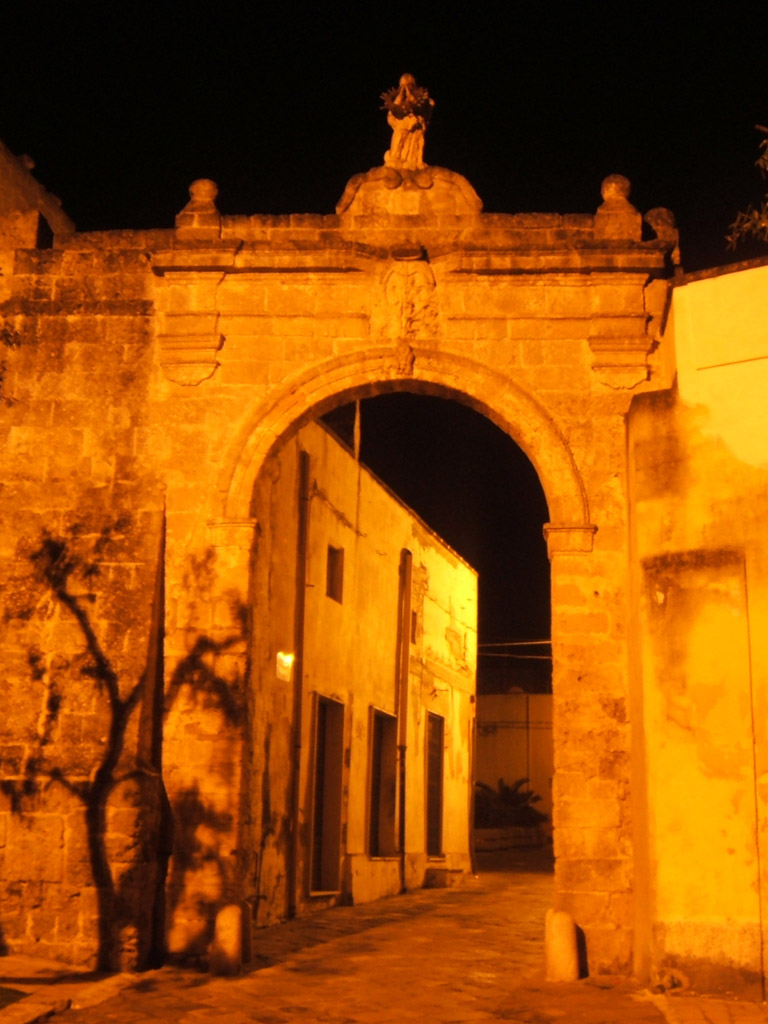 foto notturna della Porta Nuova di Veglie